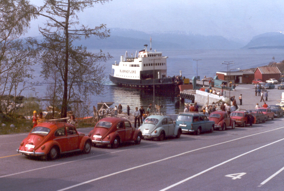 M/F Bjørnefjord (1962) docking in Løfallstrand, Kvinnherad, Norway.